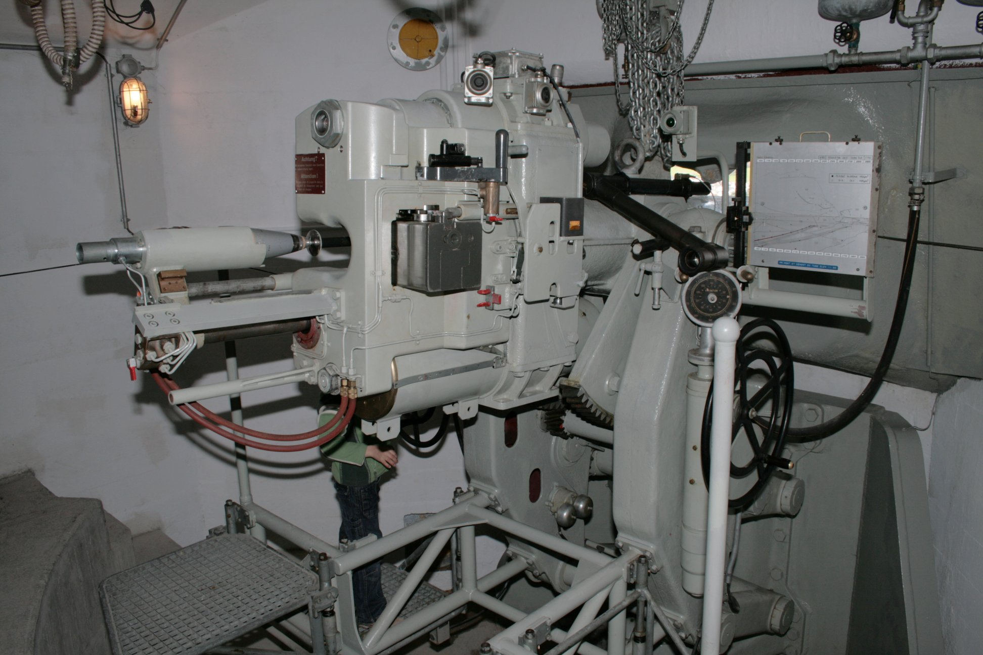 10.5 cm Panzerabwehrkanone (Festungsgeschütz)